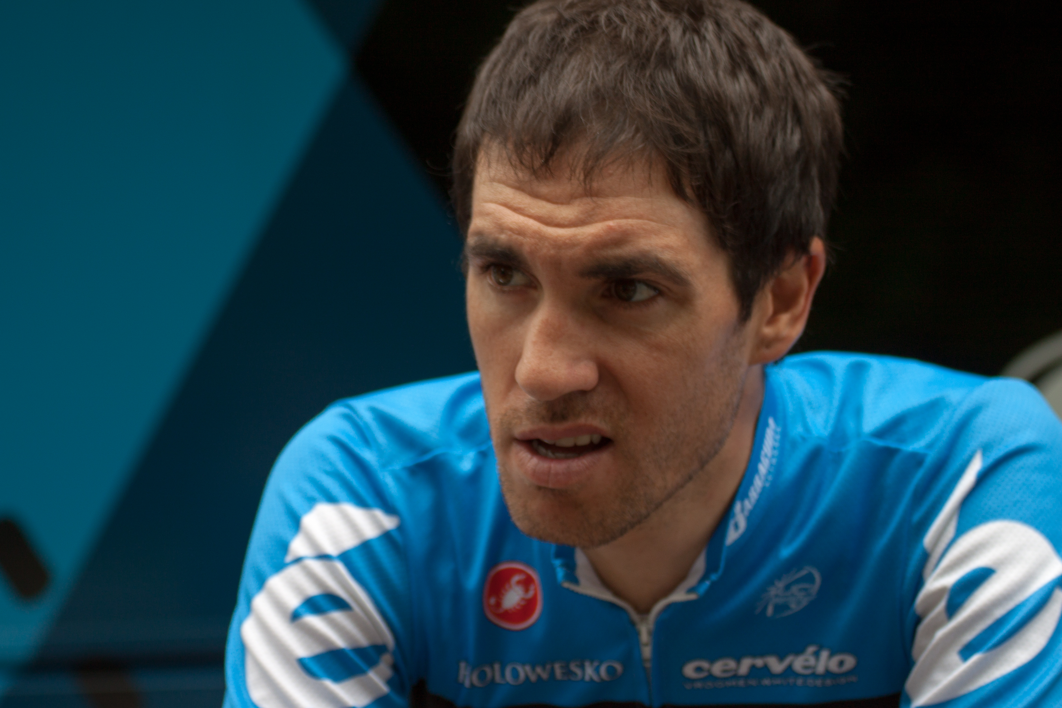 Koldo Fernandez au Prologue du Critérium du Dauphiné 2012